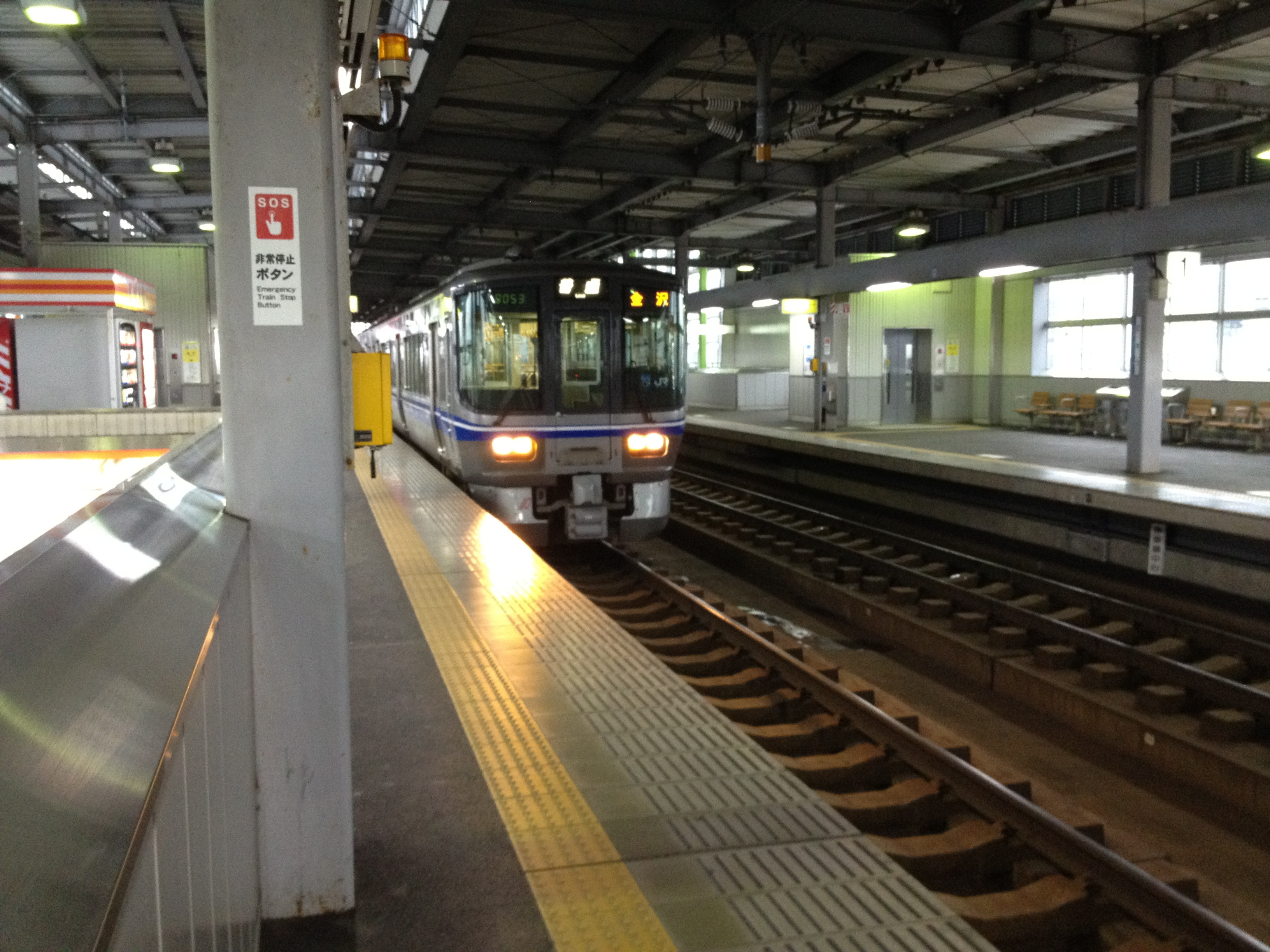 2番のりばに停車中の金沢行き521系